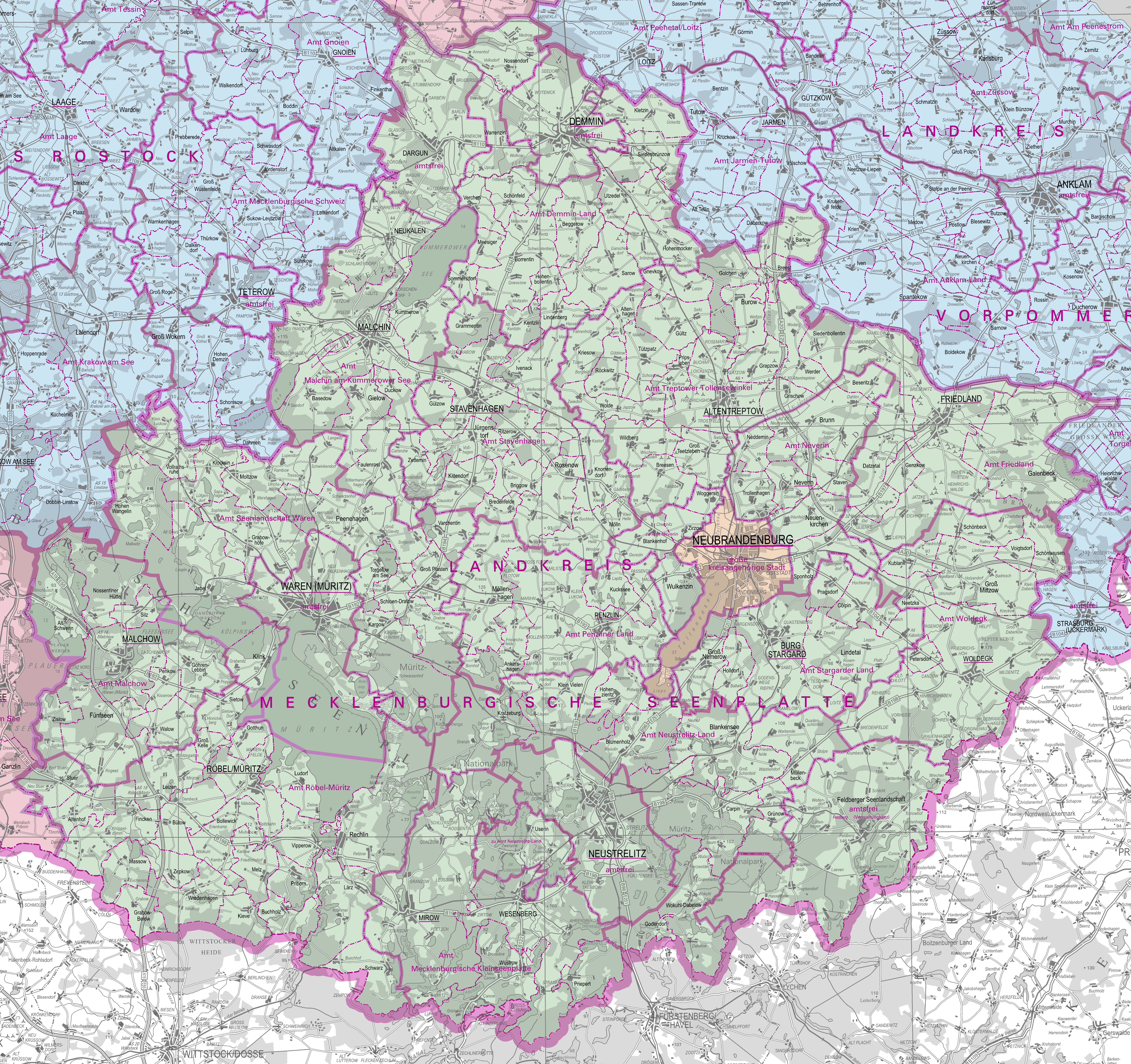 Administrative Karte des Landkreises Mecklenburgische Seenplatte 1:250.000, Stand 1. April 2015